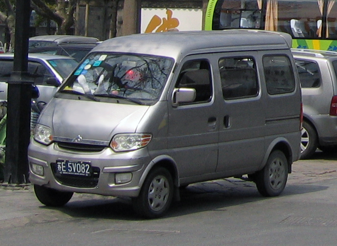 Chang'an Zhixing SC6378 (aka "Chana Star", 长安之星6378)